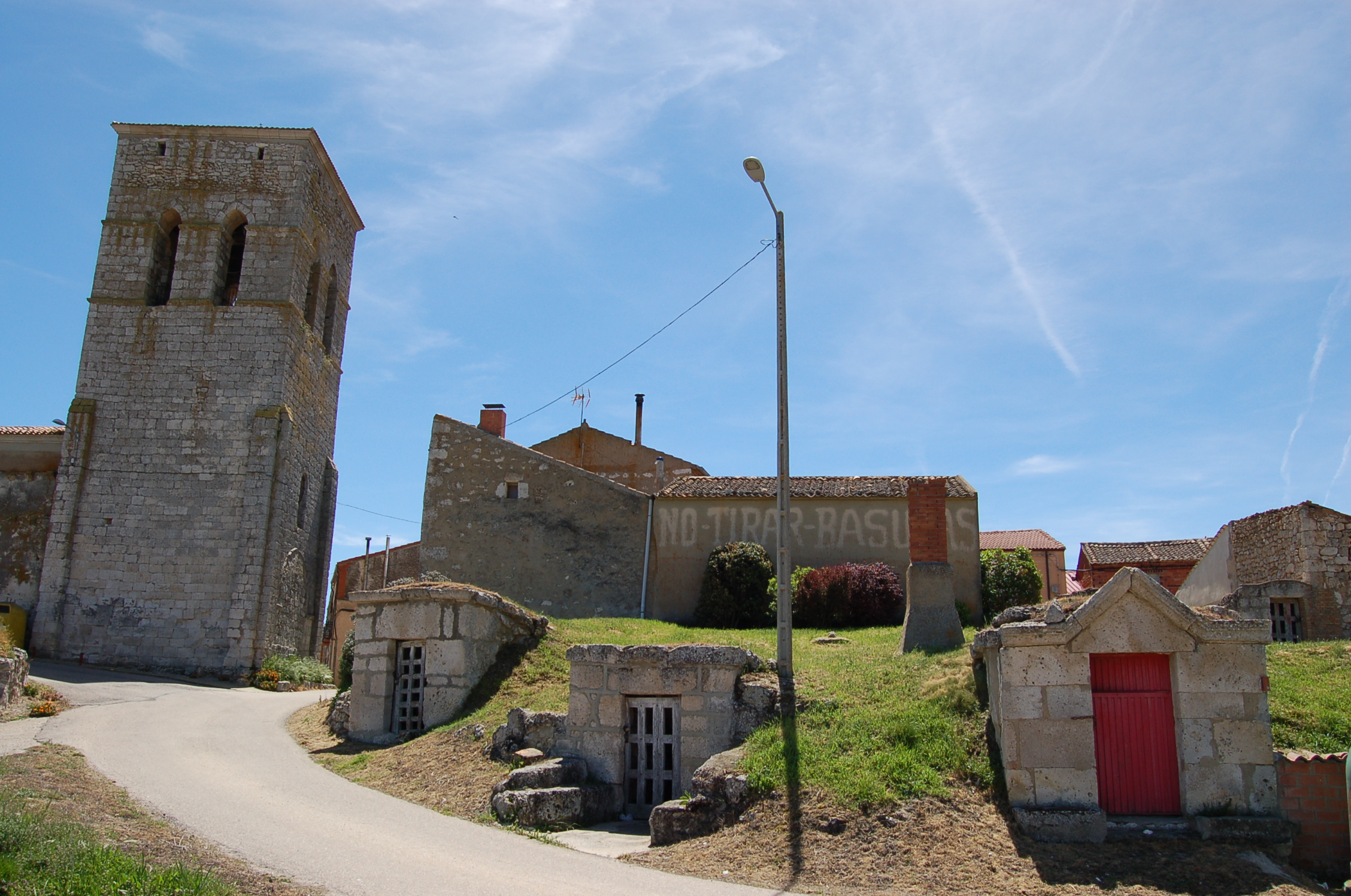 Igrexa de Villaescusa de Roa